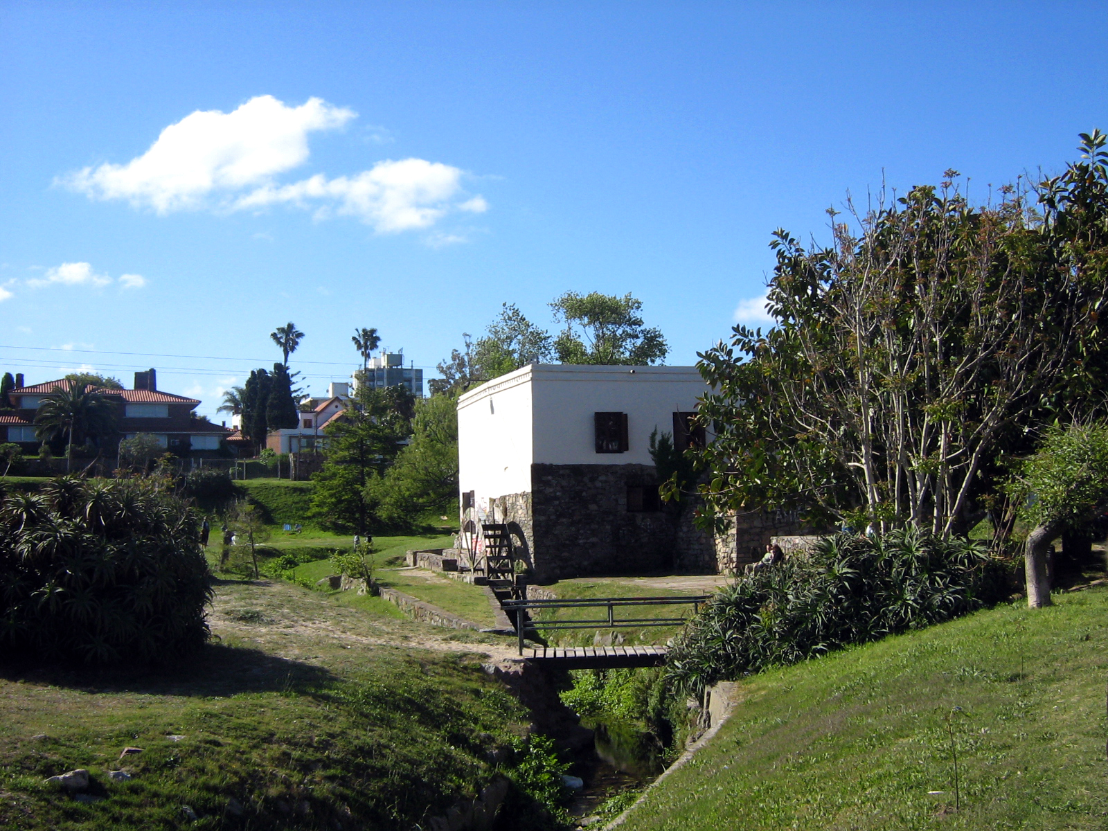 Antiguo Molino de Juan María Pérez - molino hidraúlico -. Ubicada en el departamento de Montevideo